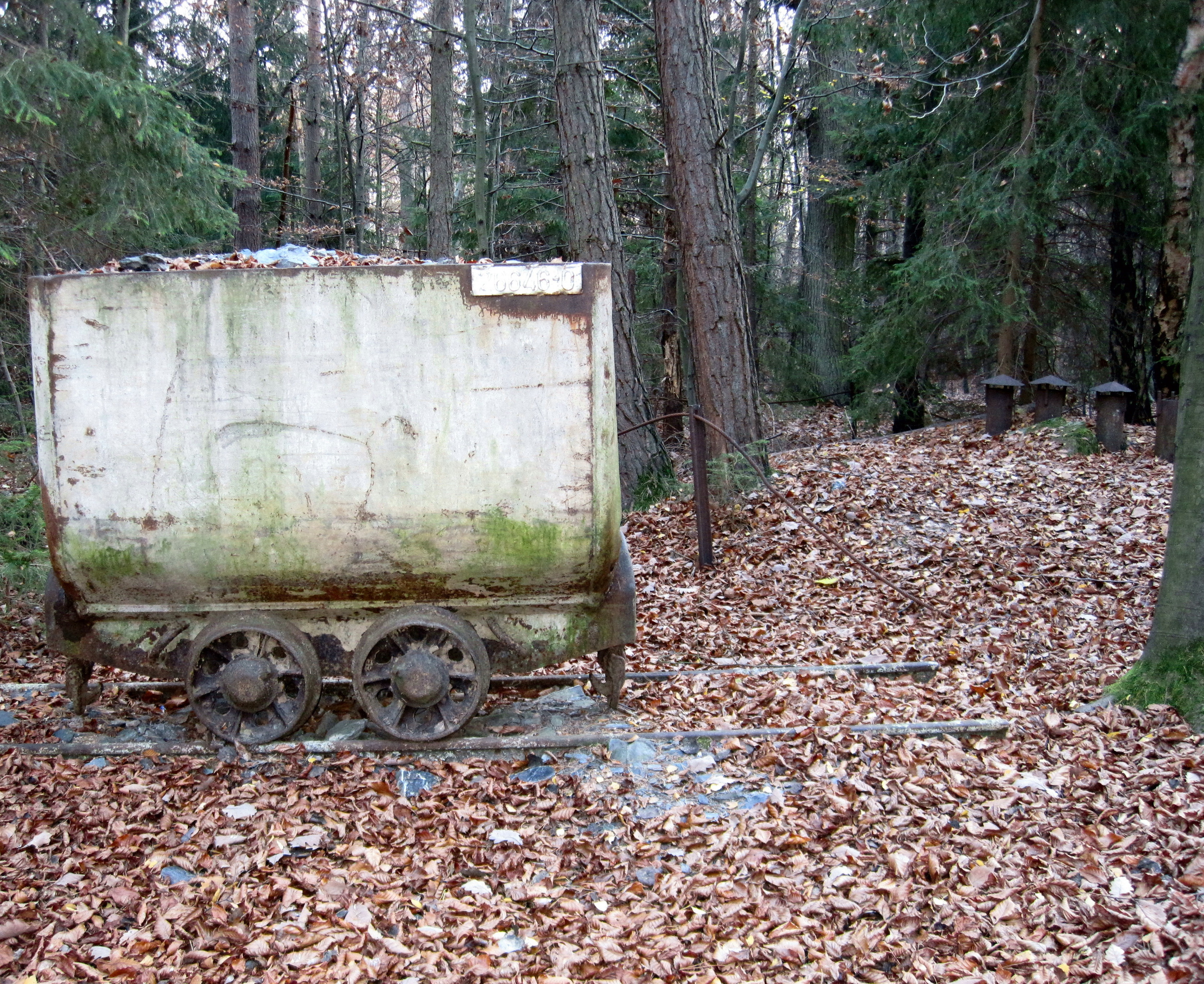 Grube Gute Hoffnung: Hunt vor dem abdeckten Werlauer Schacht, ehemals Adolf-Hitler-Schacht. Werlau, Rheinland-Pfalz